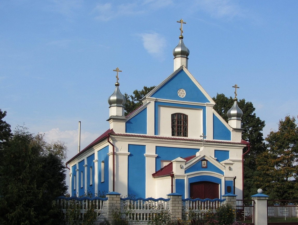 Малыя Шчытнікі. Царква